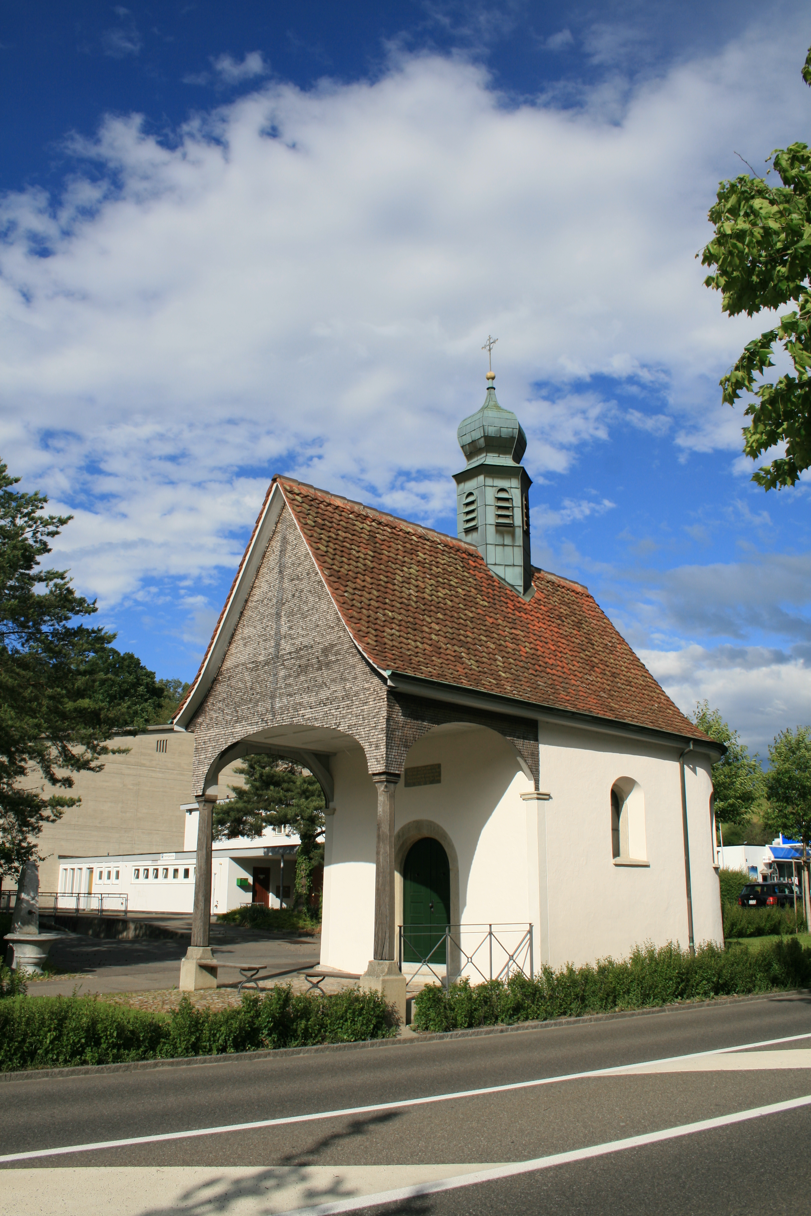 Kreuzkapelle Wettingen, Aargau, Schweiz